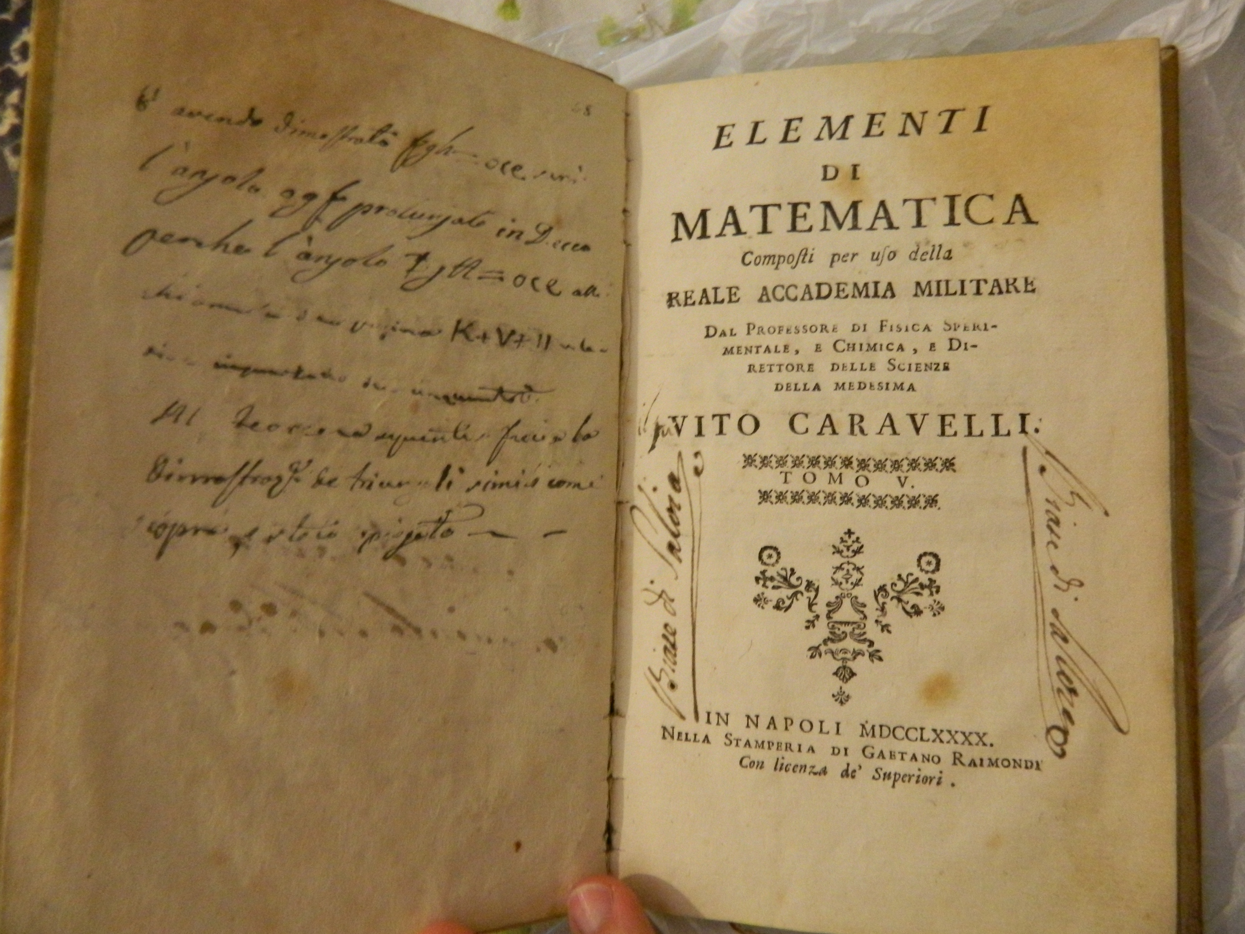 Elementi di Matematica - Tomo V (originale 1790) di Vito Caravelli per la Reale Accadimia Militare di Napoli (Scuola militare Nunziatella). Collezione privata.